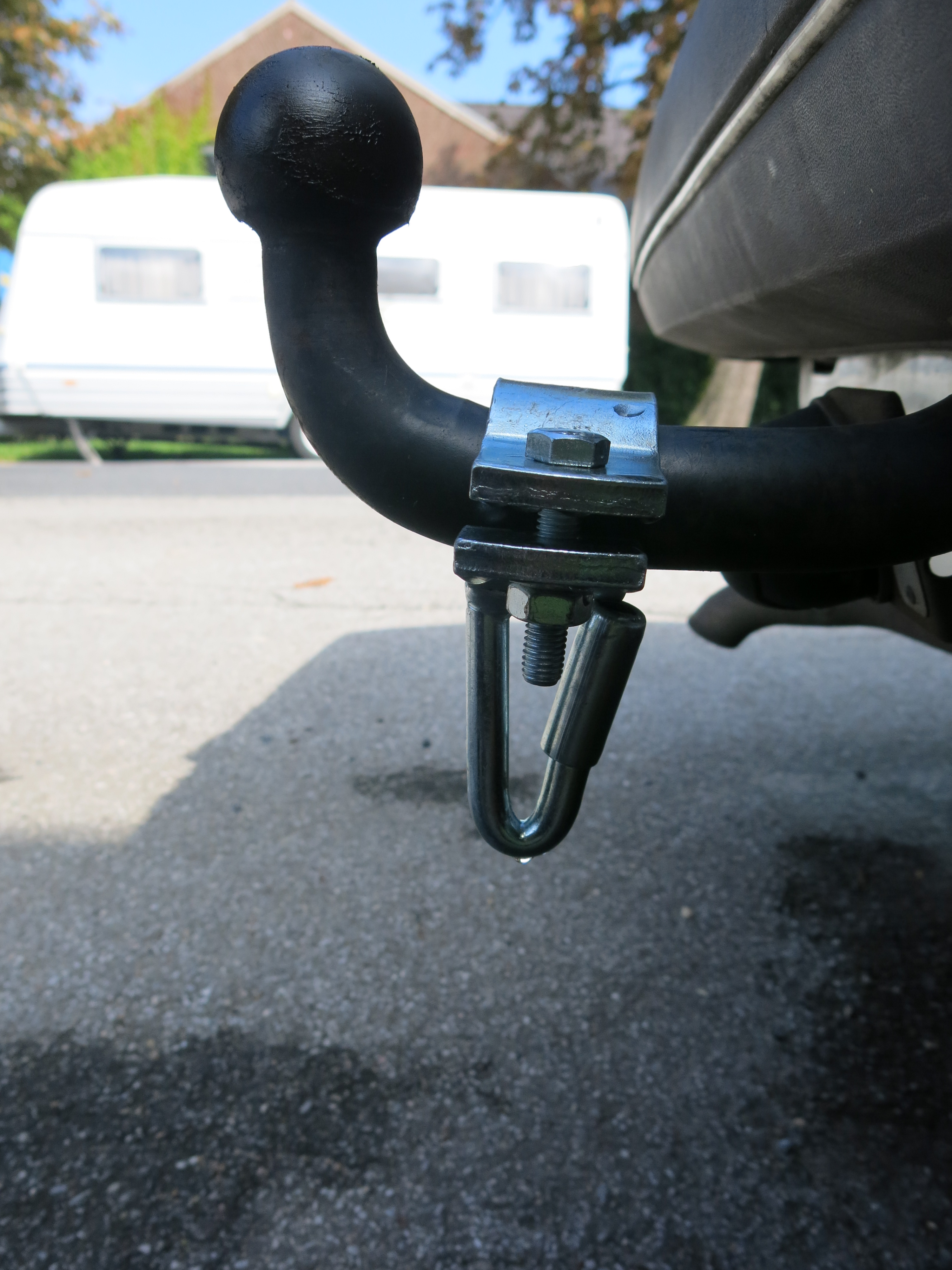 Losreißvorkehrung (bis 750 kg) oder Holland-Haken für auflaufgebremste Anhänger bis 3500 kg